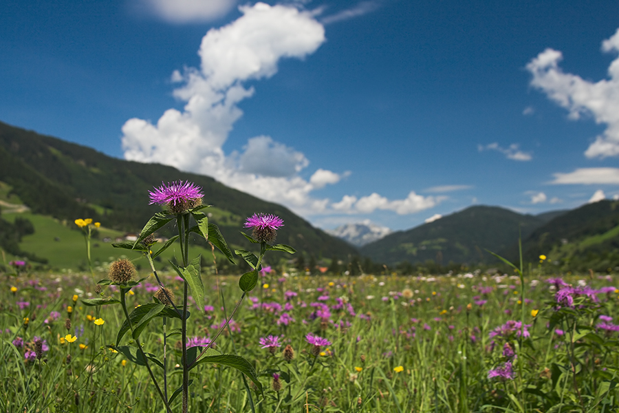 Fettwiese